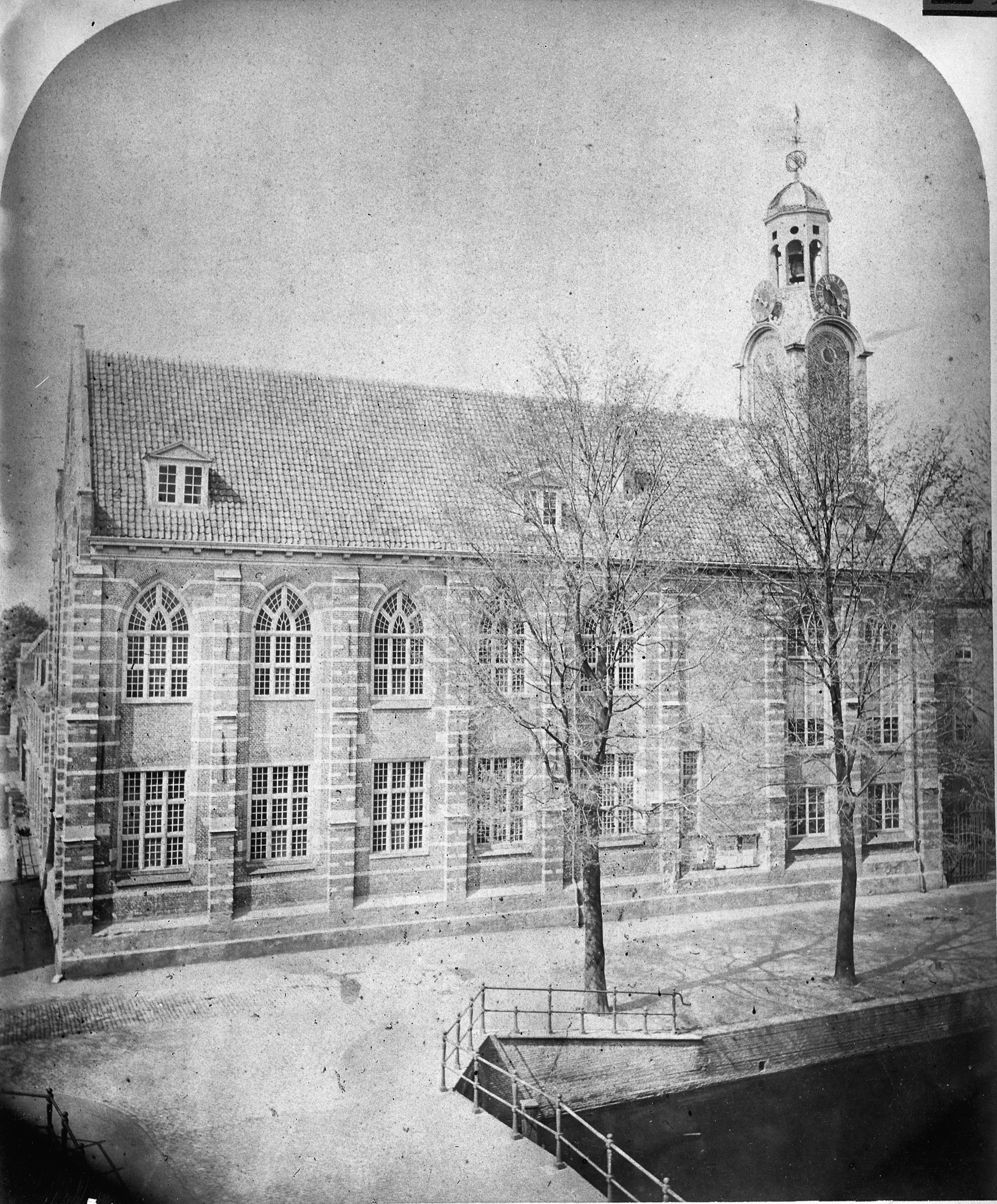 Academie: pl.m. 1875 naar oude foto